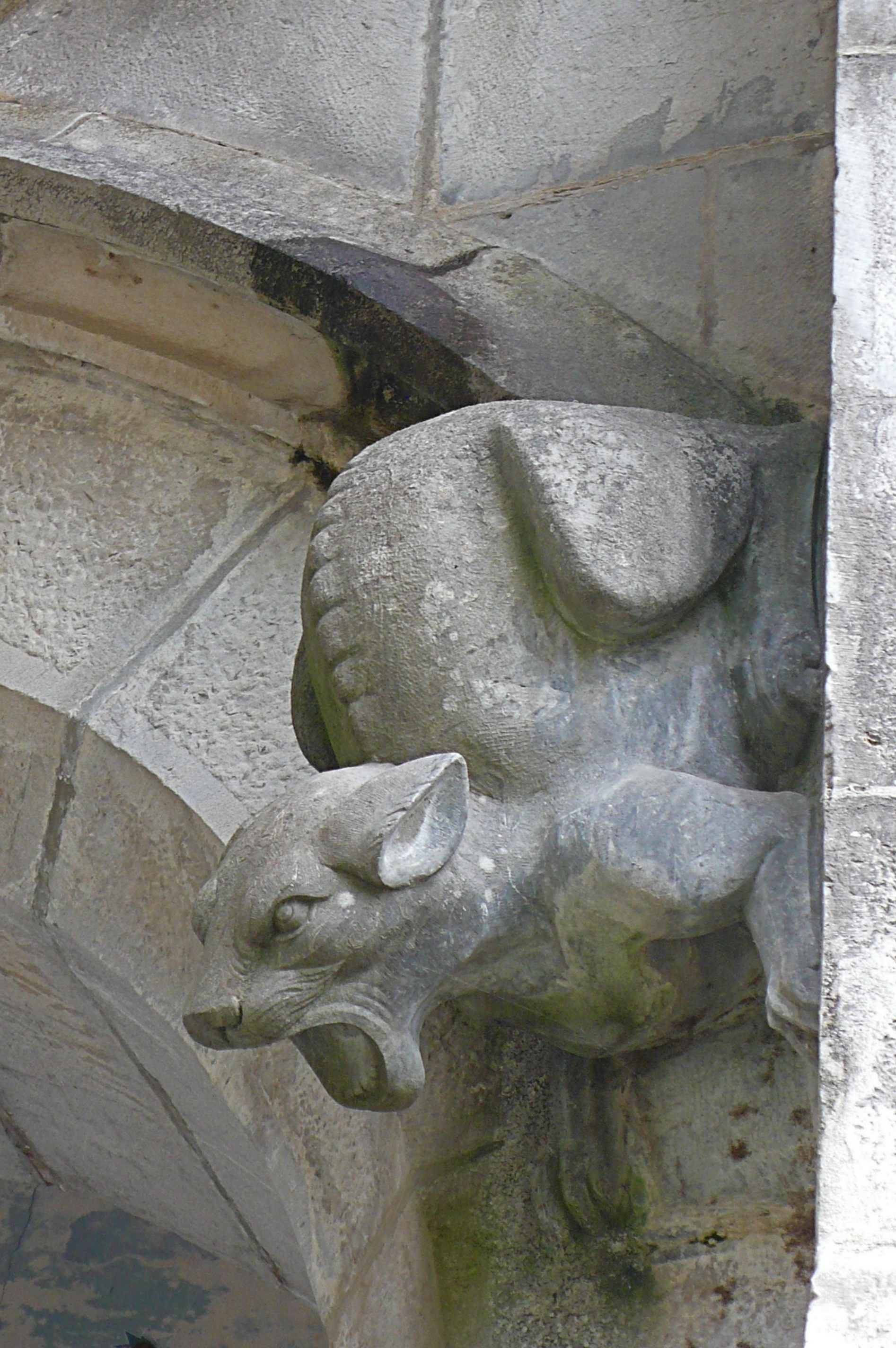 Gargouillle du château d'Abbadie, Pyrénées-Atlantiques